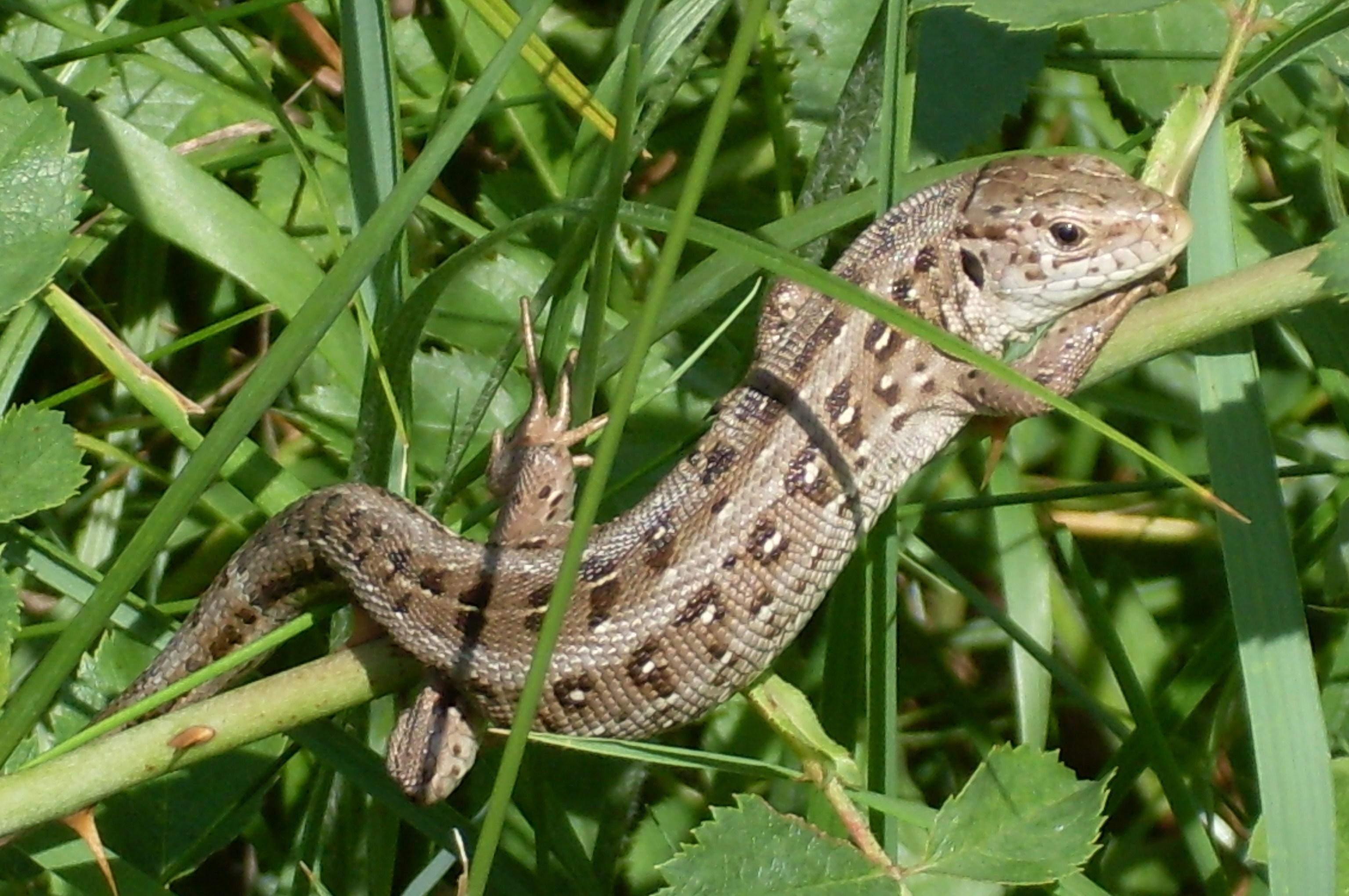 Najpospolitszy gad Lasu Bemowskiego - jaszczurka zwinka. Poligon WAT